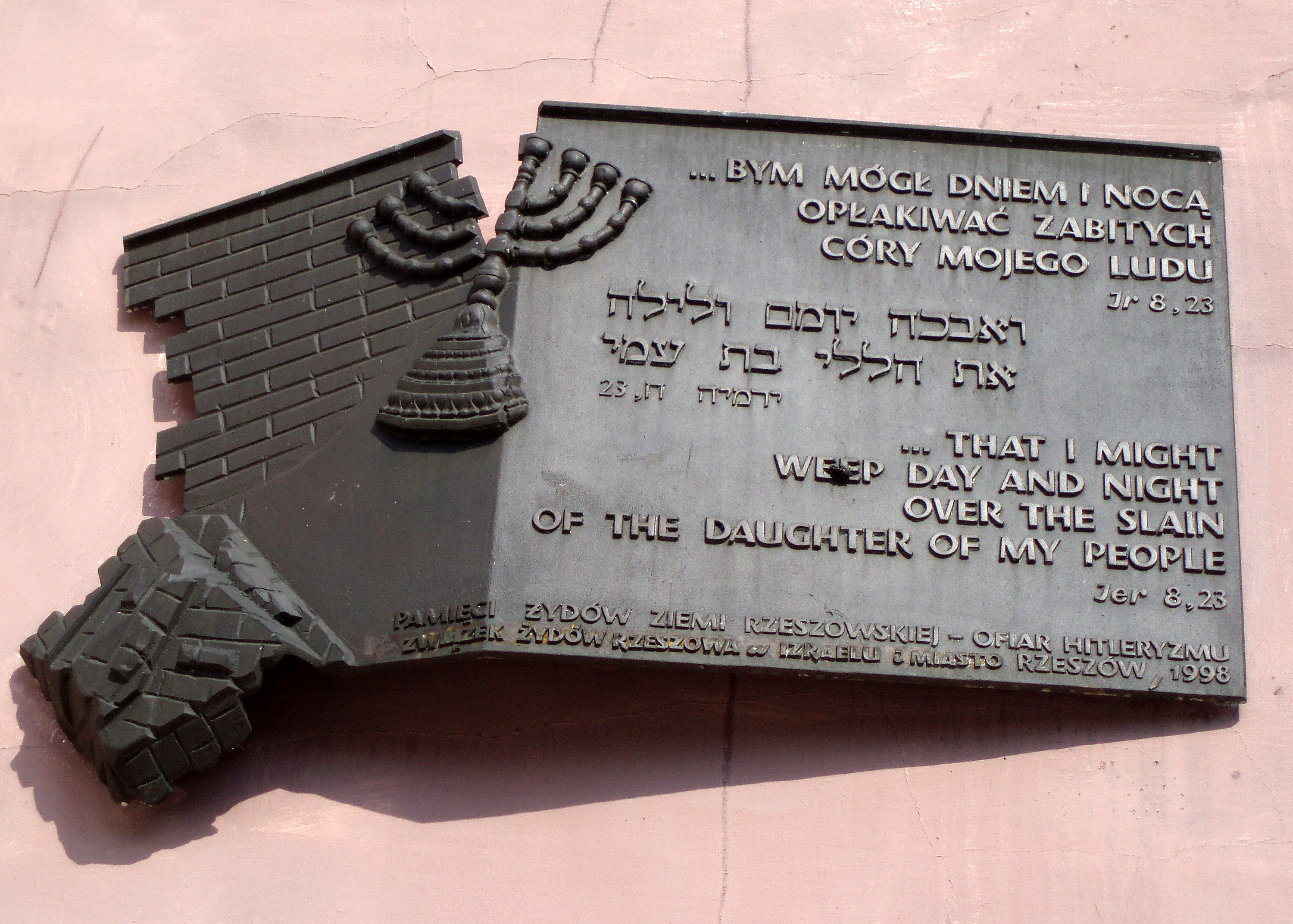 Rzeszów